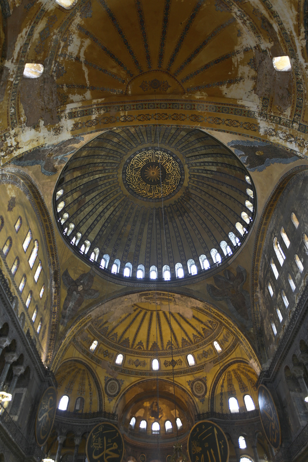 Istanbul 036